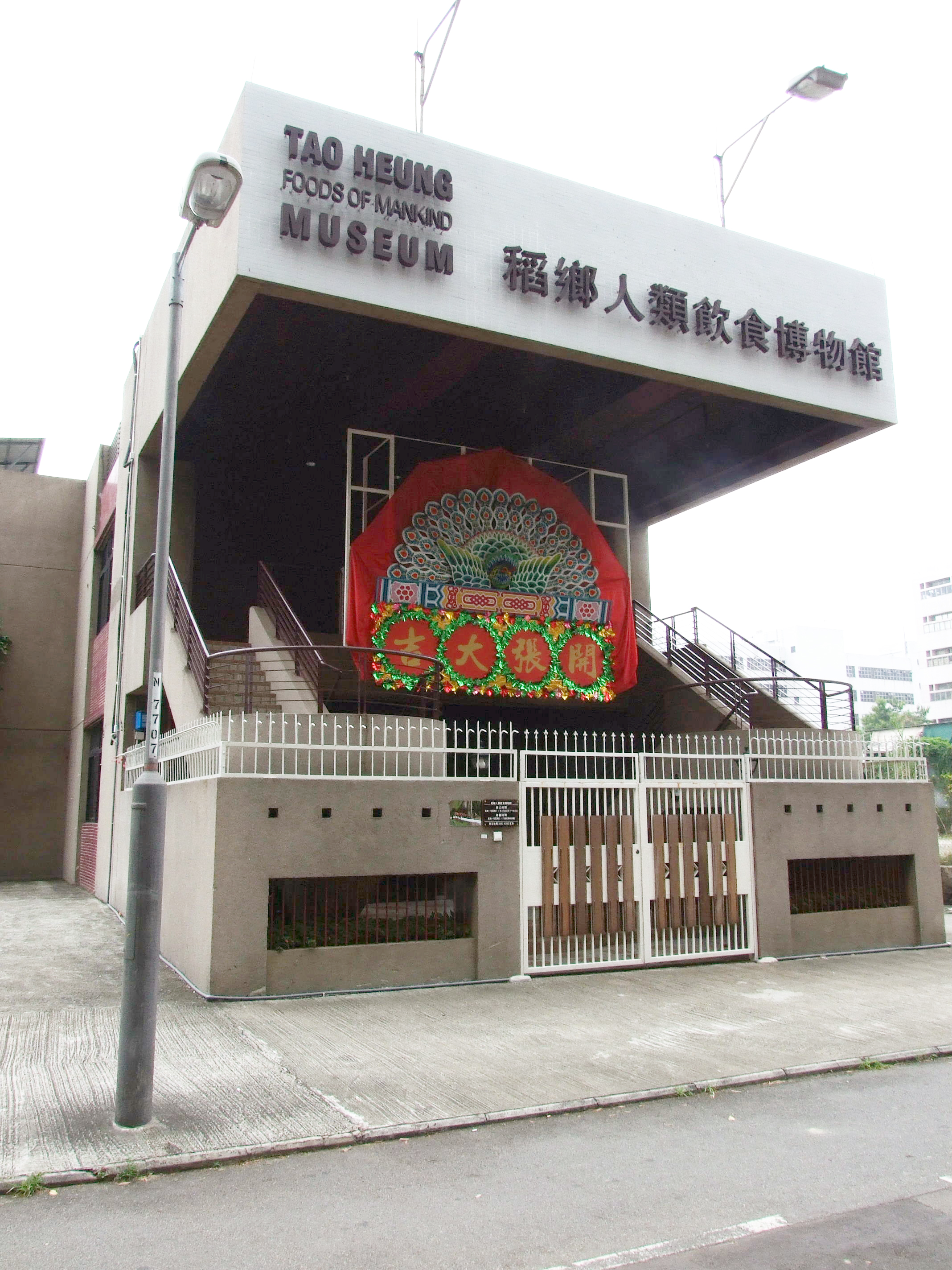 位於粉嶺樂天街的稻香人類飲食博物館